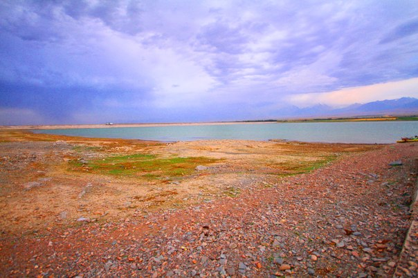 Қазақша (кирил): Теріс-Ащыбұлақ